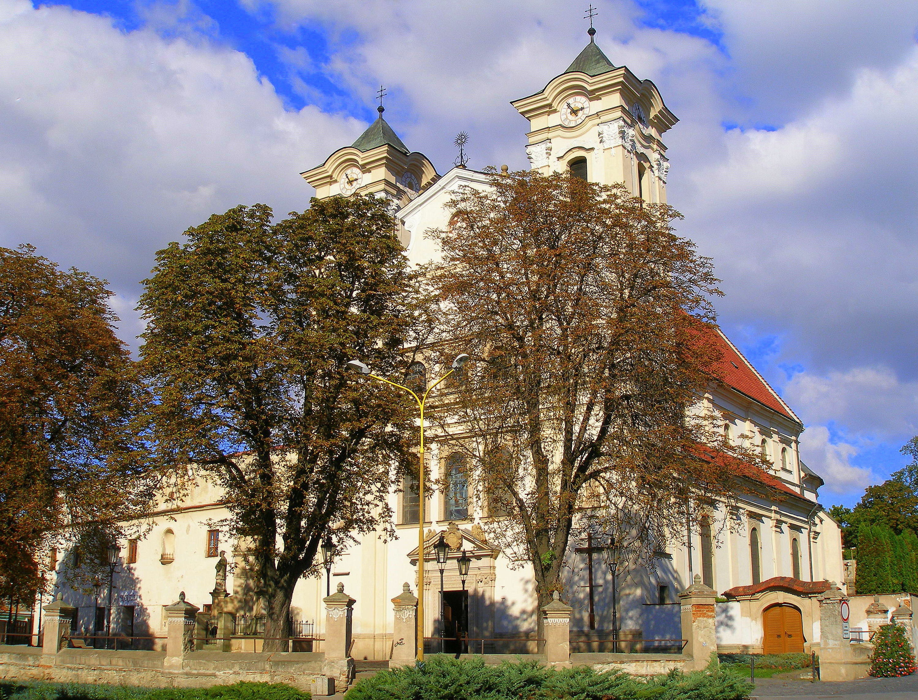 Kostol svätého Jozefa (františkánsky) Pôvodne gotický jednoloďový kostol karmelitánov z roku 1380. V druhej polovici 17. storočia prestavaný pre františkánov. Barokovú úpravu ukončil staviteľ Ján Tornyossi v rokoch 1709 až 1718. Sochy svätcov na fasáde sú z dielne Šimona Griminga z roku 1734.